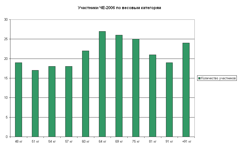 Распределениепо весовым категориям участников ЧЕ-2006 по боксу